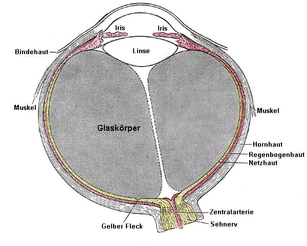 Anatomie des menschlichen Auges. Henry Gray (1825-1861): Anatomy of the Human Body. 1918. Horizontalschnittbild, der Sehnerv zeigt zur Nase Das als „Hornhaut“ bezeichnete Gewebe ist eigentlich die „harte Augenhaut“, auch „Lederhaut“ oder „Sclera“ genannt. Die Hornhaut befindet sich als Schutzhaut vor der Iris und vor der vorderen Augenkammer und leistet einen bedeutenden Beitrag zur Gesamtbrechkraft des Auges. Zudem ist „Regenbogenhaut“ ein anderer Name für die Iris, das Gewebe, das in der Zeichnung als „Regenbogenhaut“ markiert ist, ist die Aderhaut.